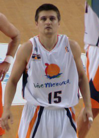 Sasa Vasilevic-Menorca Basquet 06/07